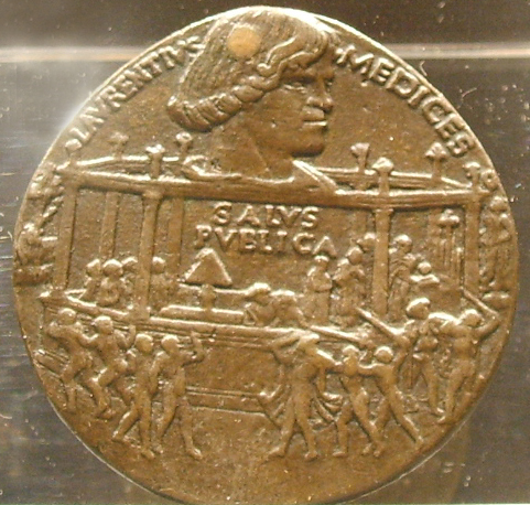 Bertoldo di Giovanni, Medaglia della congiura dei pazzi (seconda metà del XV secolo). Attributed to Pedro Berruguete 1478 Bronze, diameter: 6,4 cm Washington, National Gallery of Art